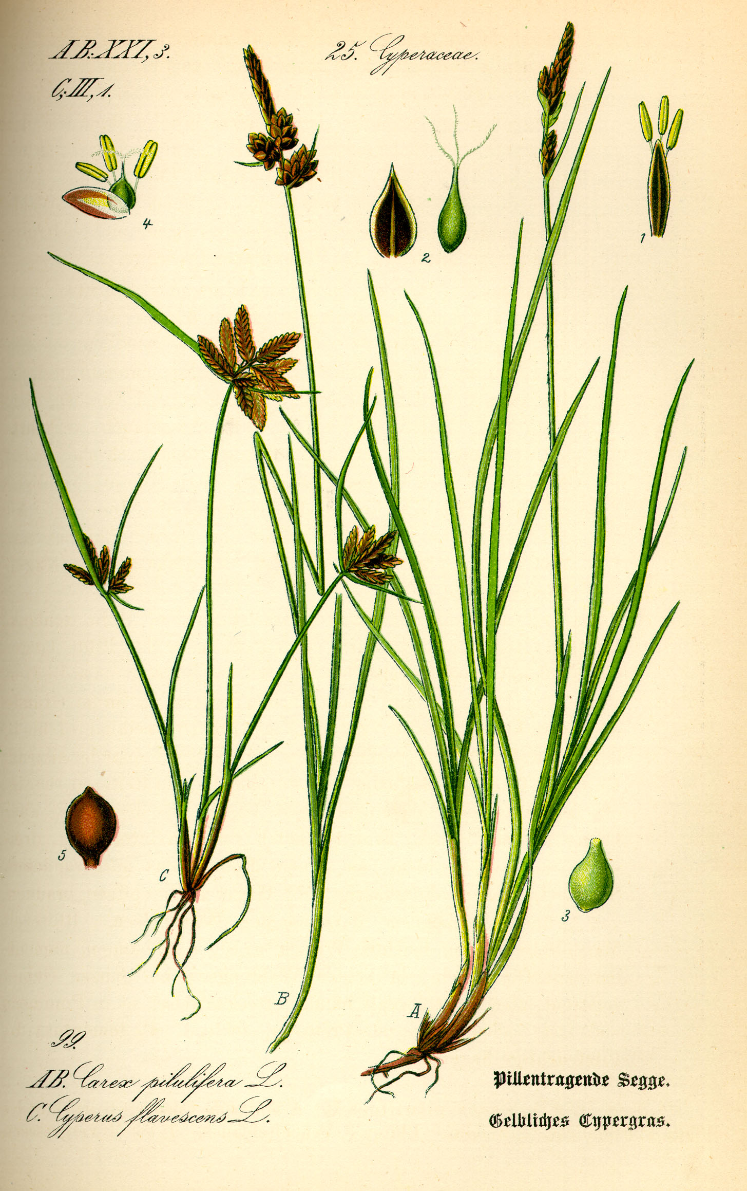 Carex pilulifera and Cyperus flavescens